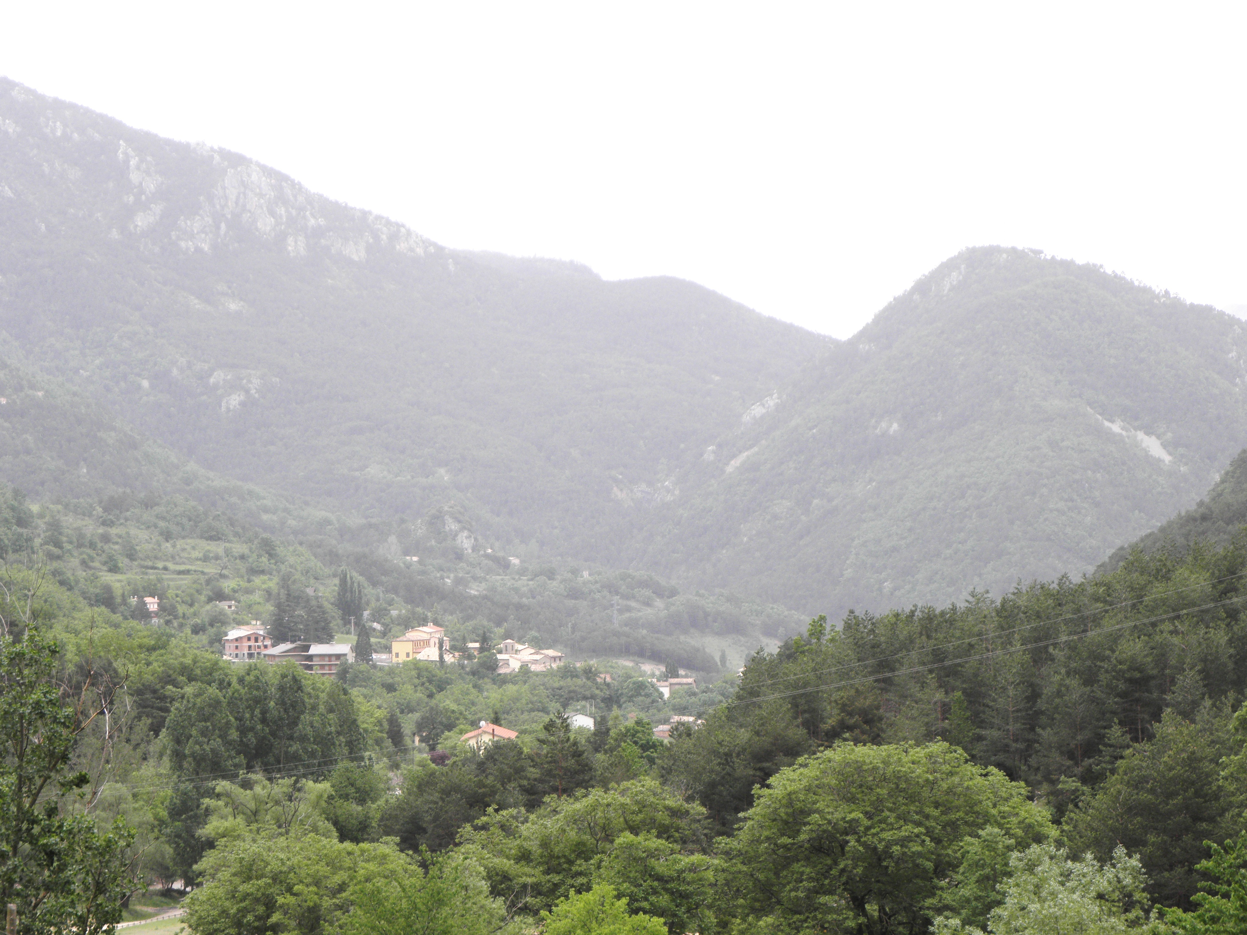 La Coma i la Pedra (Solsonès). Al centre de la imatge, el poble de la Coma. Damunt seu s'hi entreveu el campanar de l'església de Sant Sadurní de la Pedra i a la seva dreta, el Roc de la Pedra. Al fons, a l'esquerra, la Serra de Pratformiu i a la dreta el Serrat del Jou. Entremig, la vall del Riuet de la Pedra.